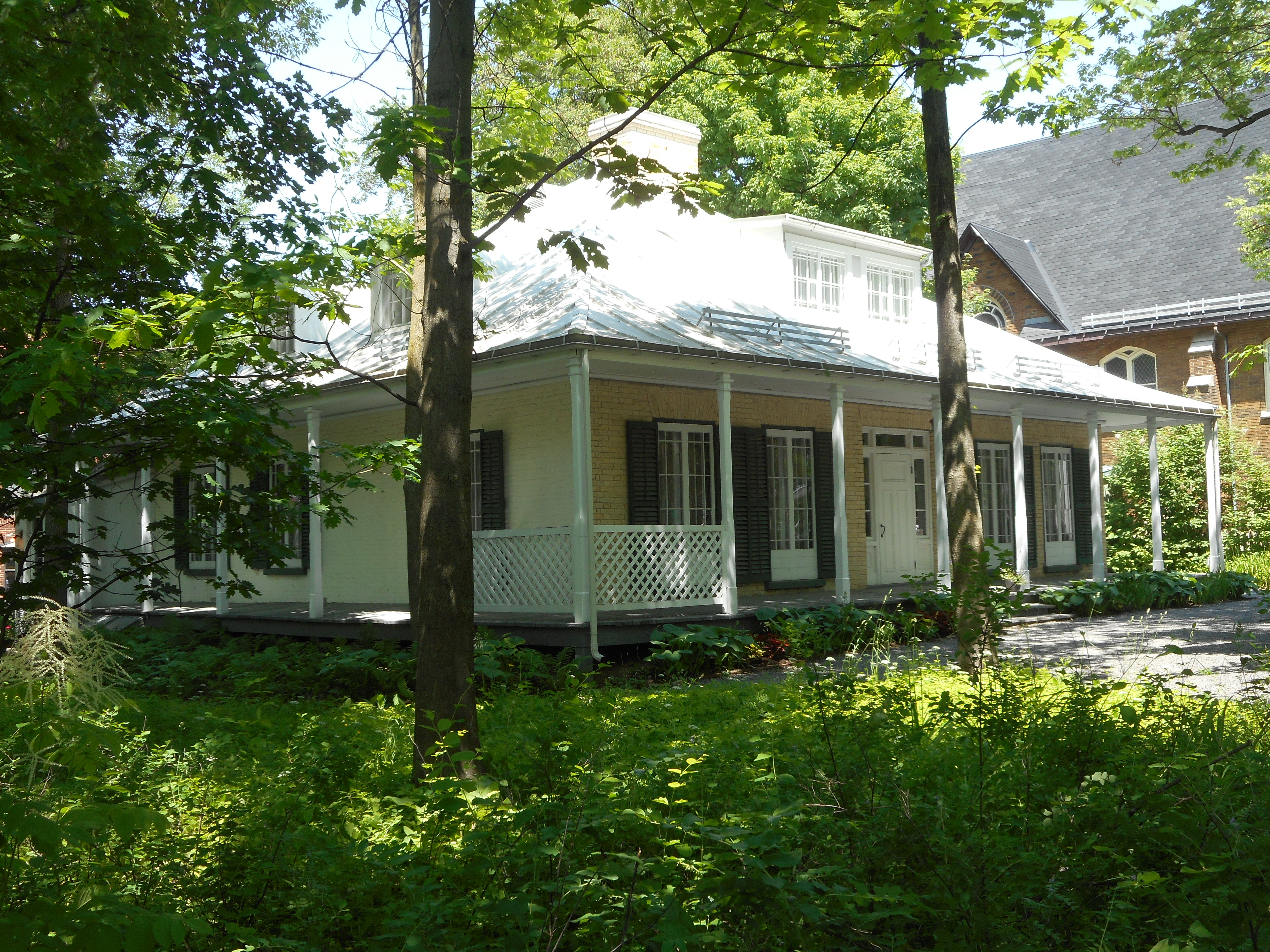 Maison Henry-Stuart, 82, Grande-Allée Ouest, Québec historicplaces.ca